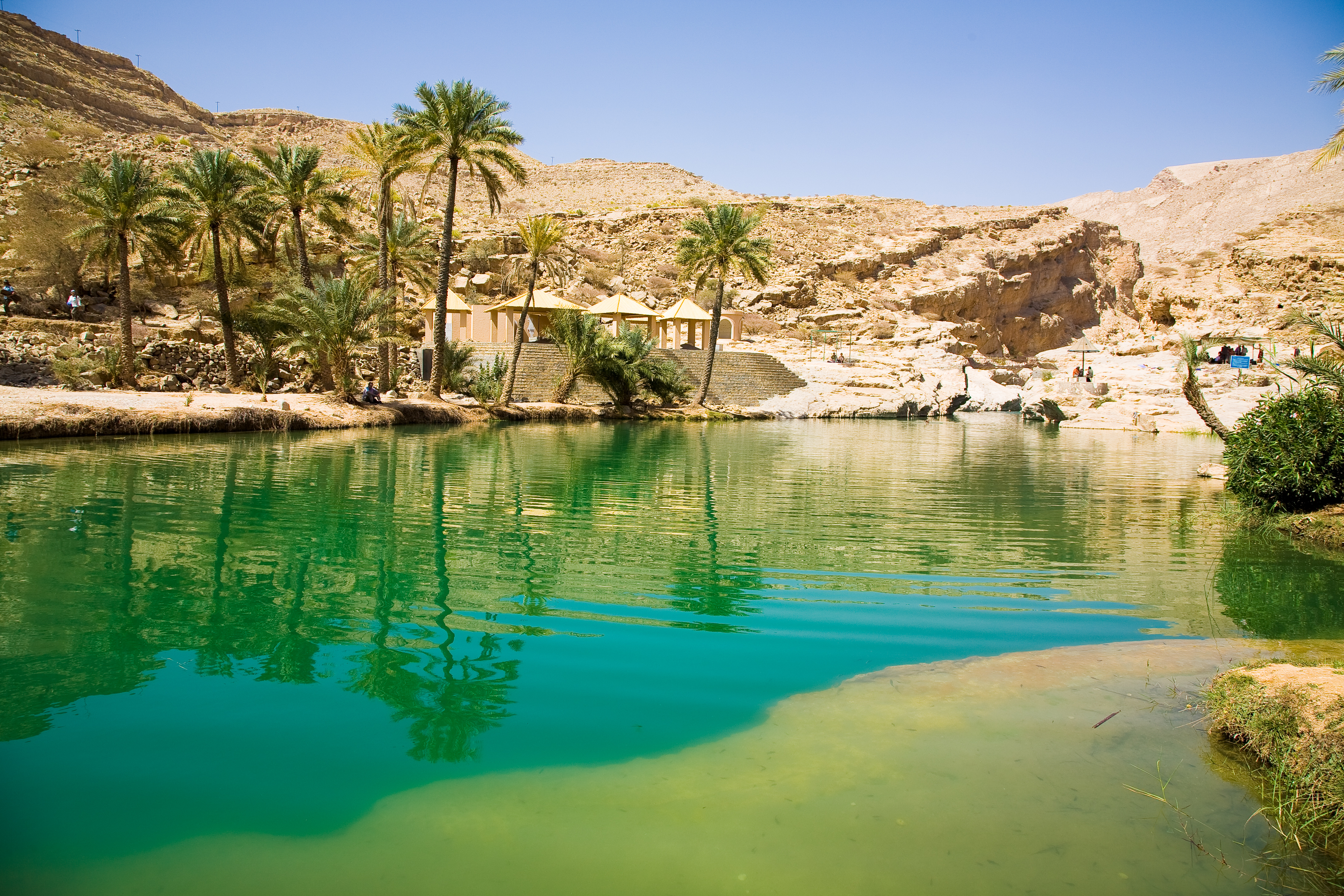 Wadi Bani Khalid, Oman